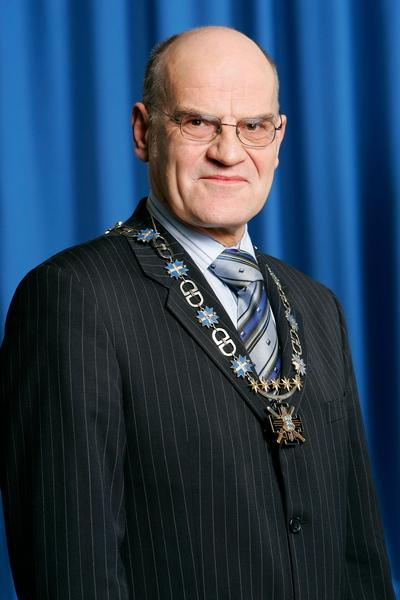 Priit Männik